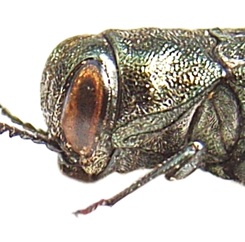 Kopf und Prothorax, doppelte Seitenrandkante des Halsschildes, das Feld zwischen der eigentlichen und der falschen Seitenrandkante ist durch die Belichtung etwas heller als die umgebenden Gebiete.